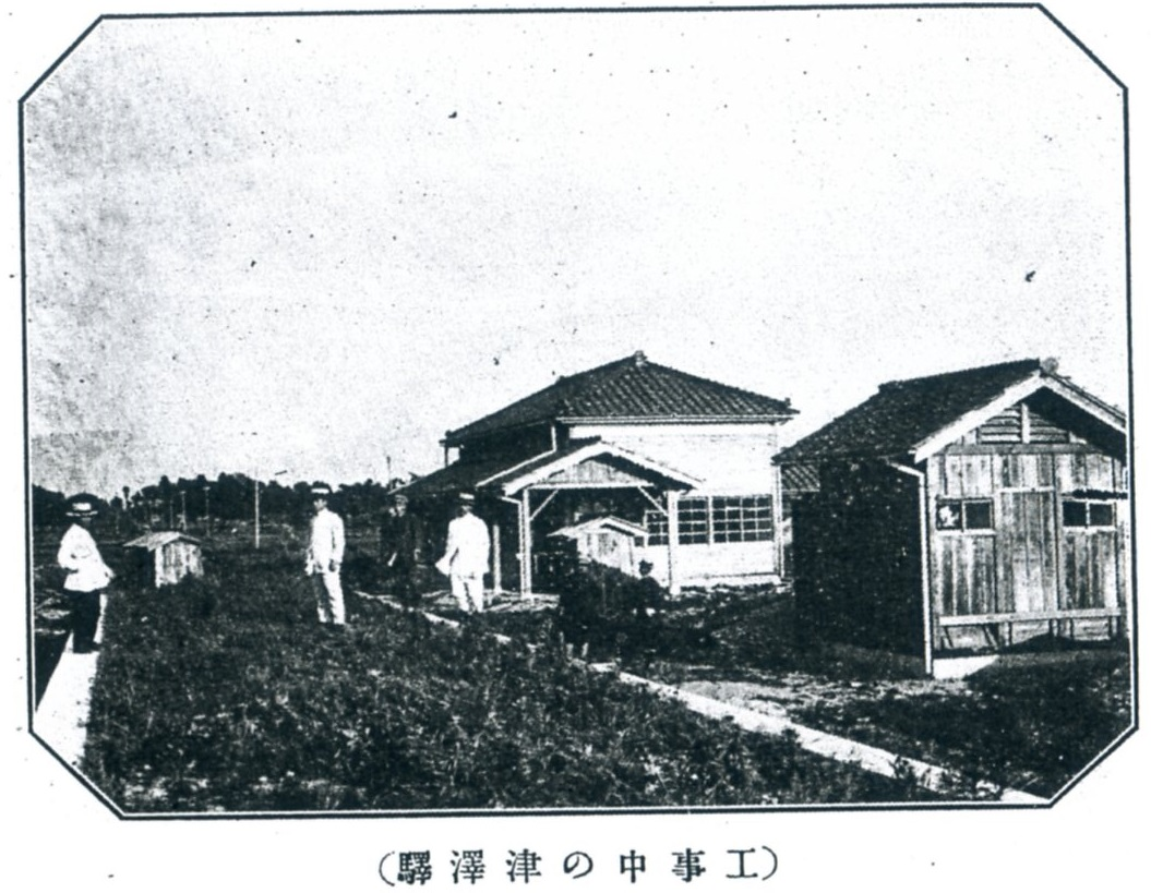 加越鉄道津沢駅